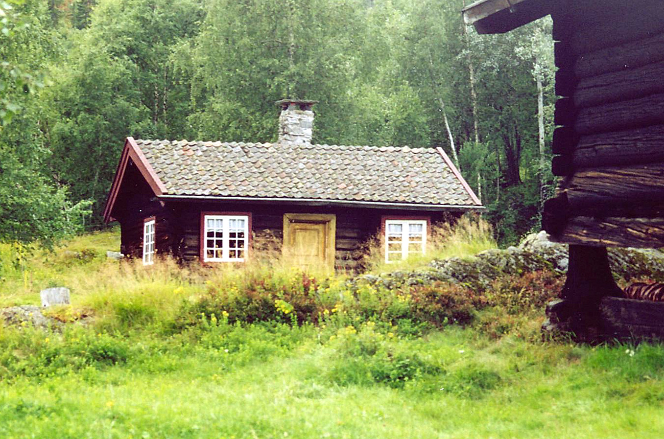 Sommerstua på Dåsettunet i Flesberg. Foto: Kjetil Bjørnsrud